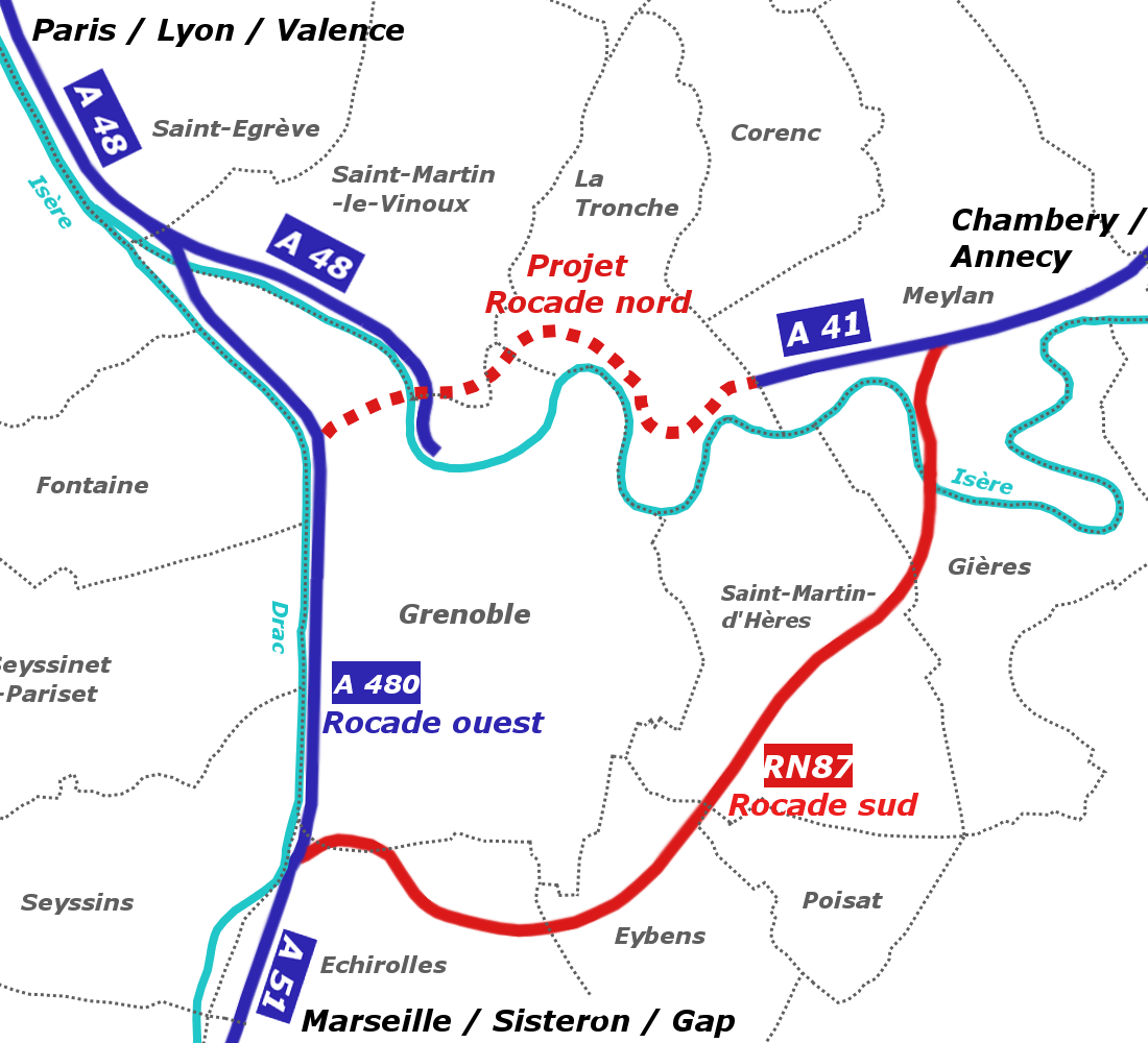 Péripherie routière de Grenoble